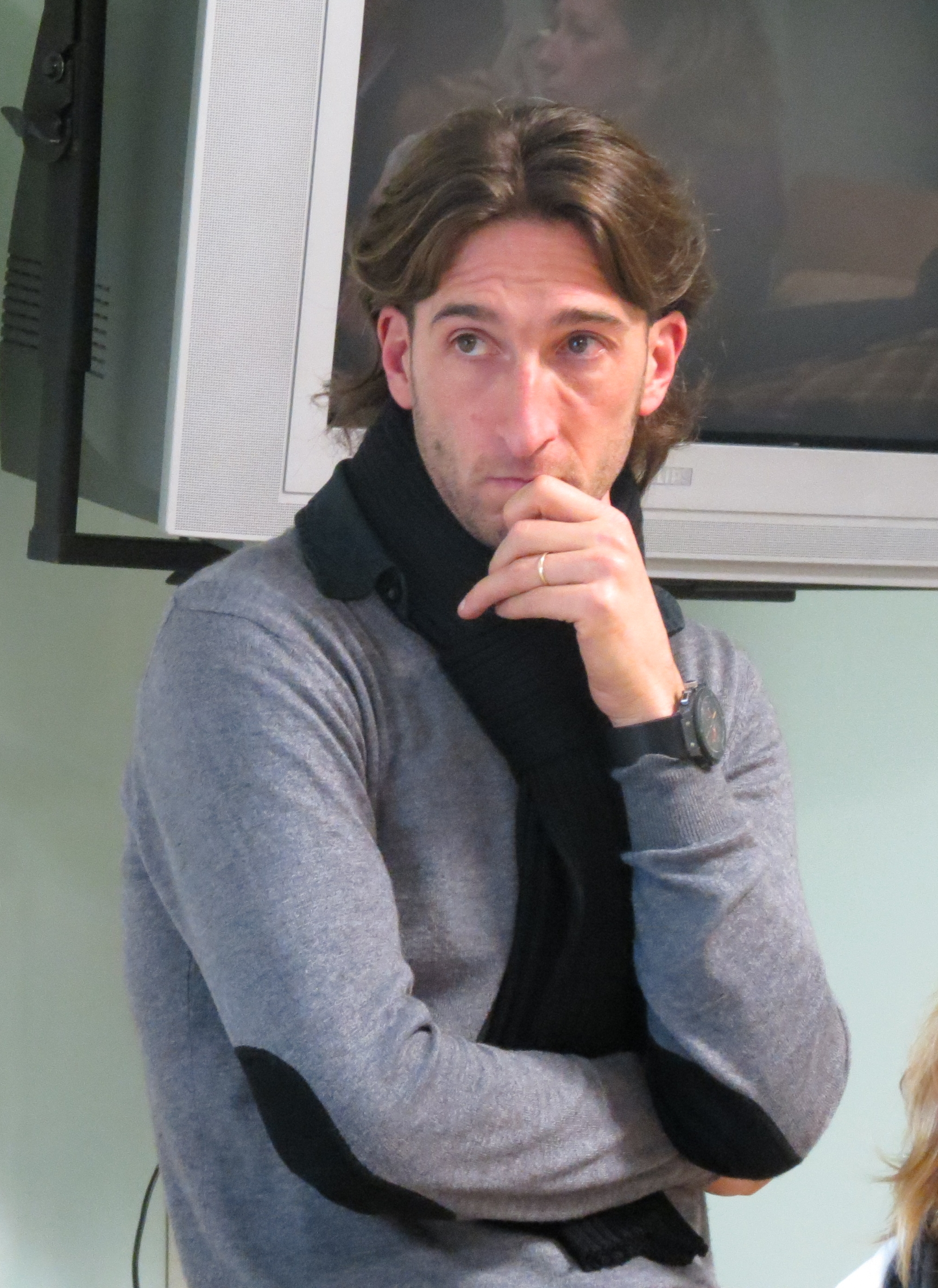 Frédéric Biancalani, novembre 2012